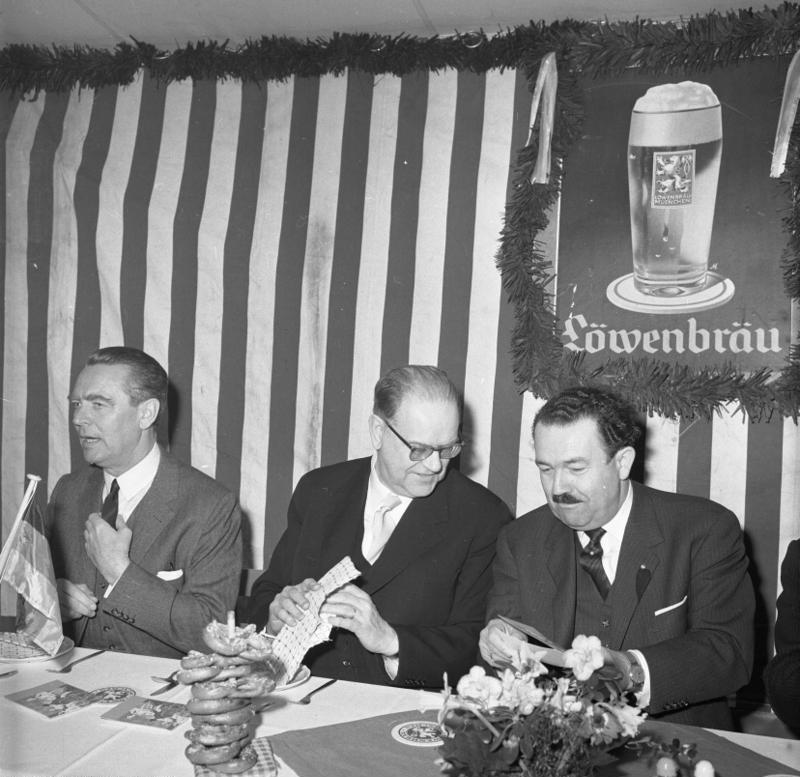 Besuch des schwedischen Ministerpräsidenten, Tage Erlander Im Bierzelt München